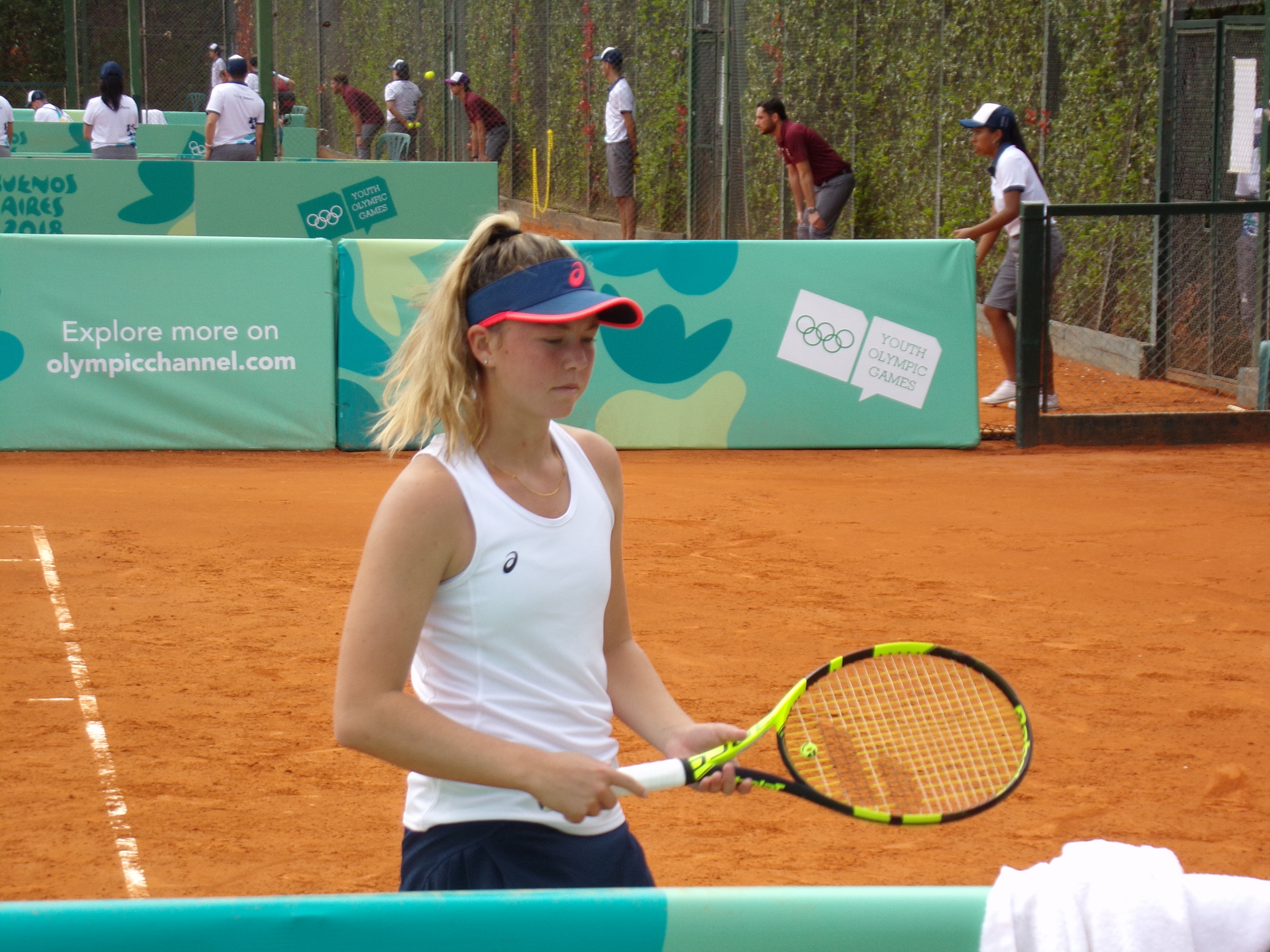 JJOO de la Juventud Buenos Aires 2018.